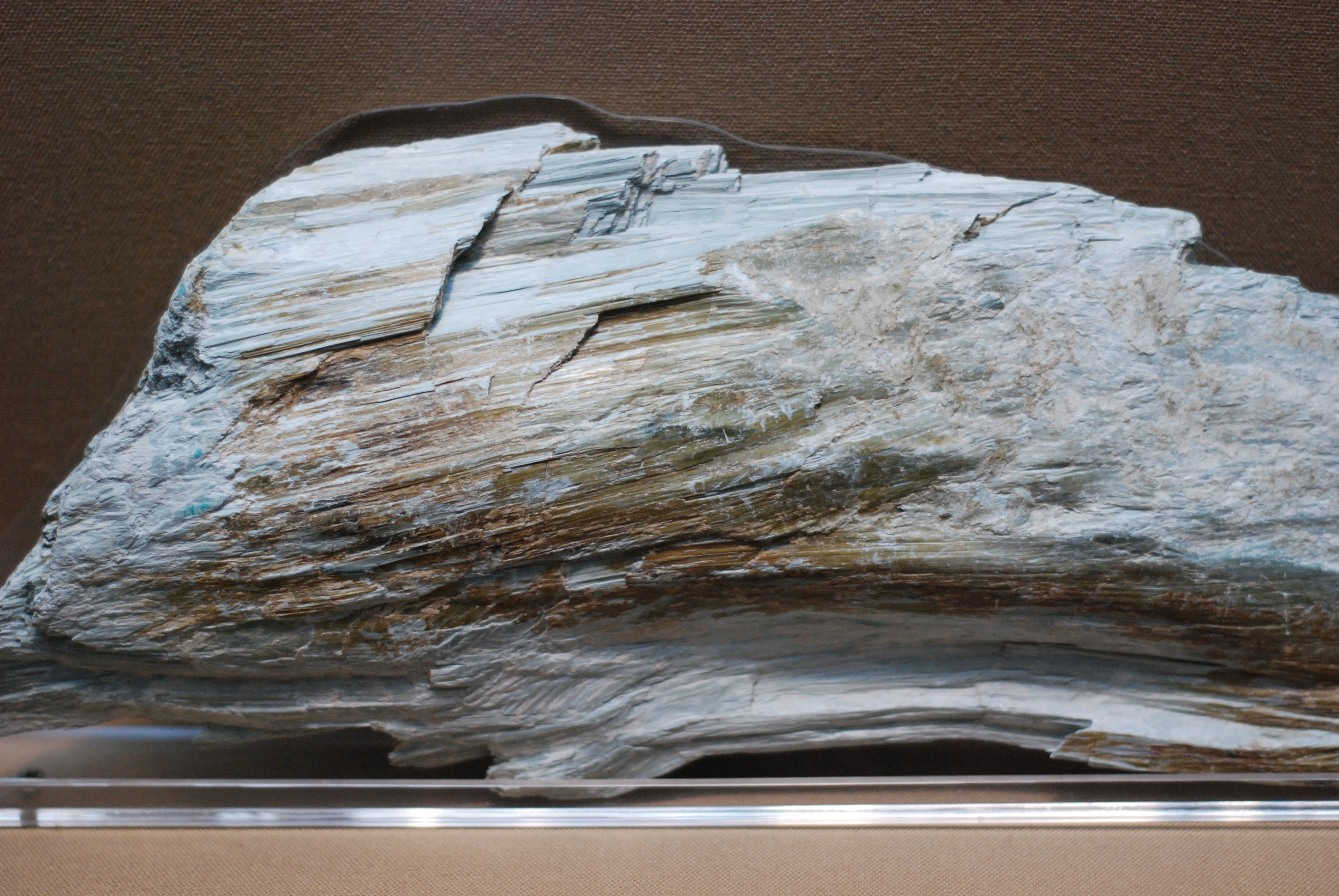 Antigorita (Mg,Fe)3Si2O5(OH)4. Mina Rivadavia, Mendoza.